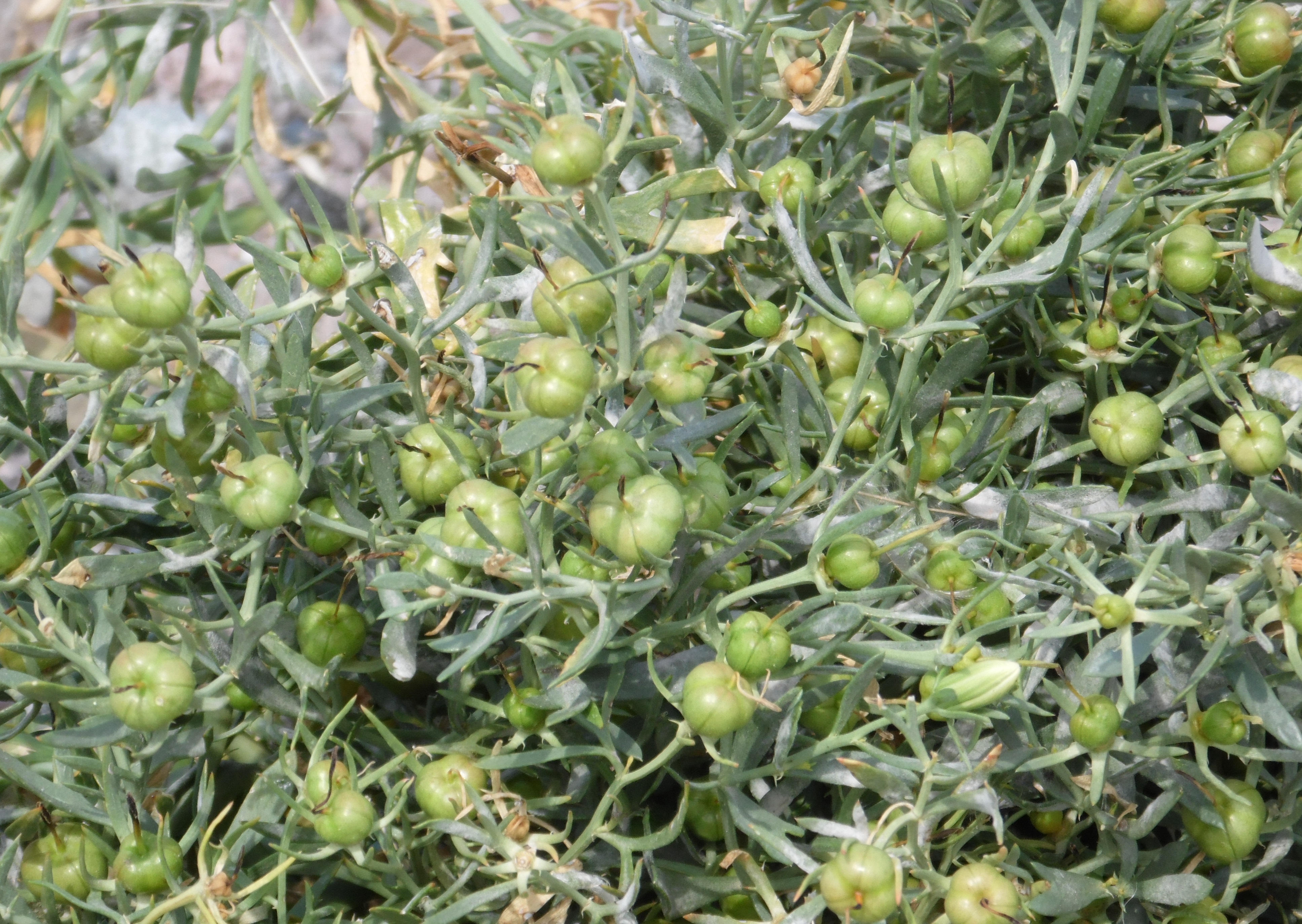 üzerrik otu